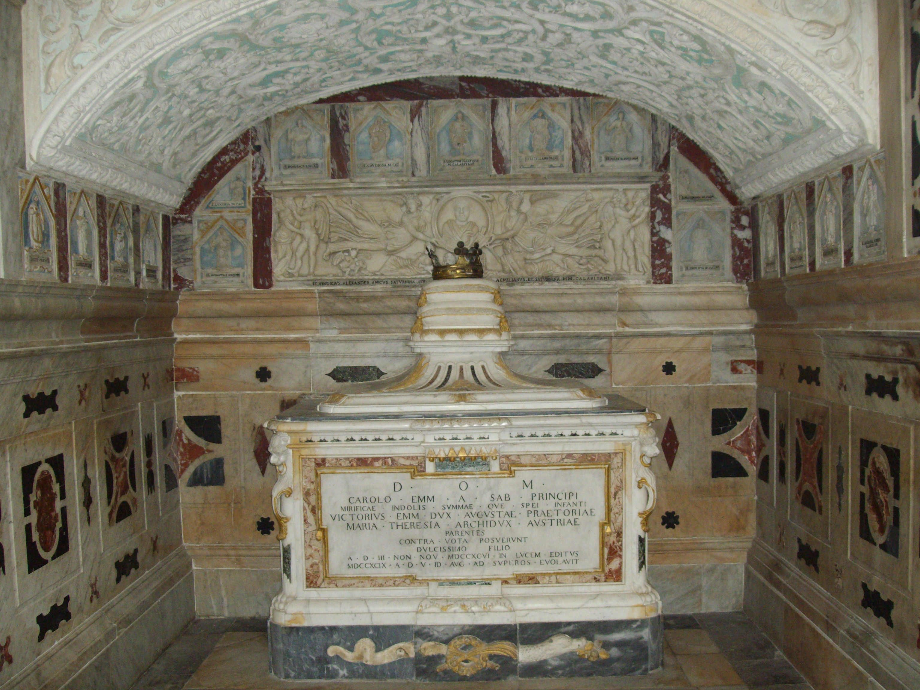 Cappella di San Saturnino e mausoleo del principe Carlo Emanuele di Savoia (1796-1799) nel Santuario dei Martiri - Cattedrale di Cagliari. Dietro, il frontale di un sepolcro di epoca romana.